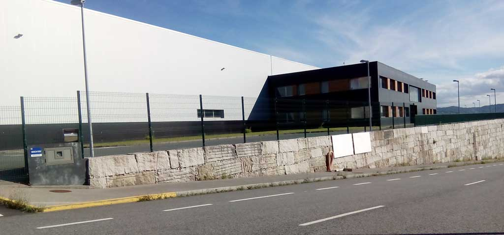 Vista de Soluciones Poligráficas no polígono das Somozas.